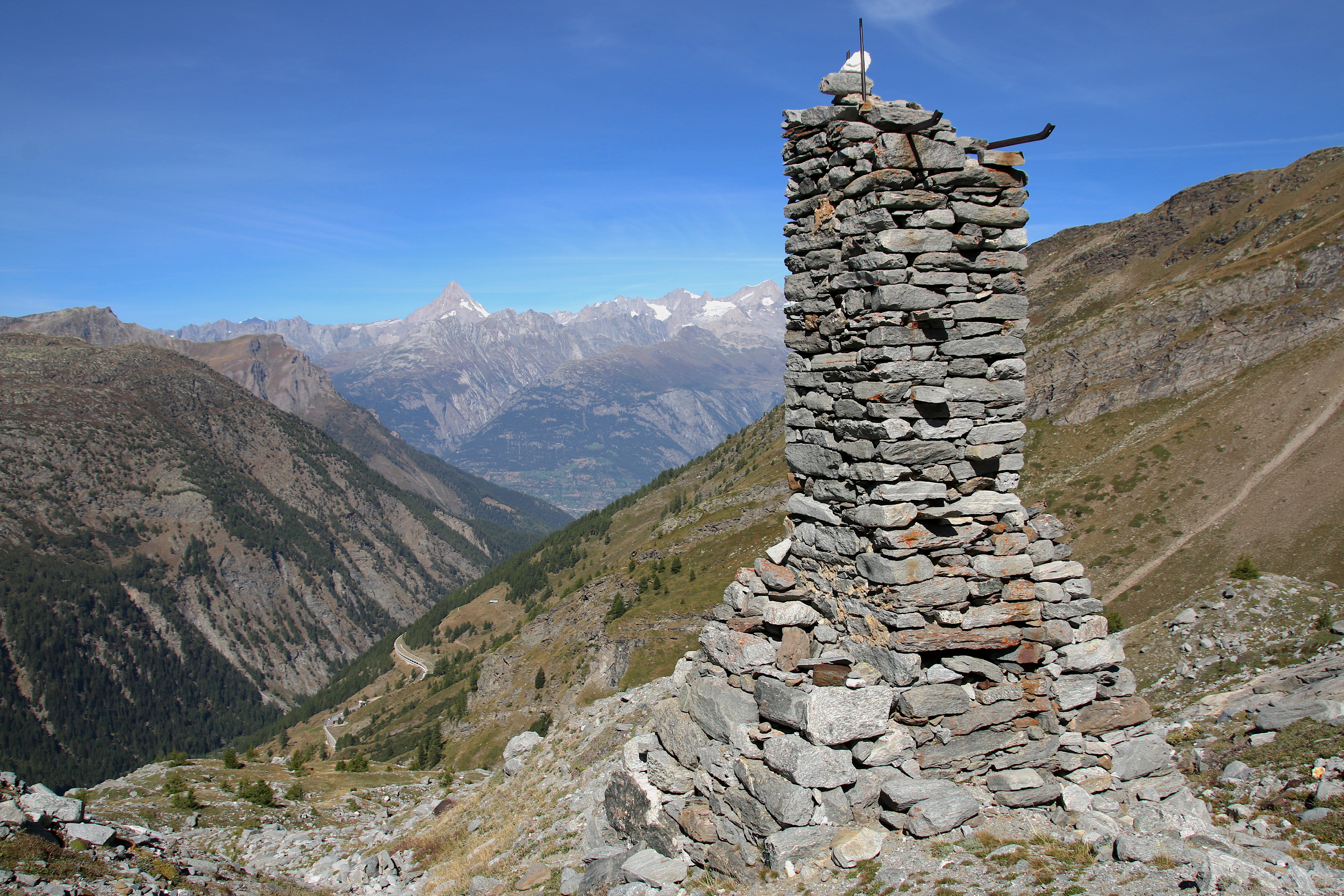 Chaltwassergletscher Eisabbau (2018)